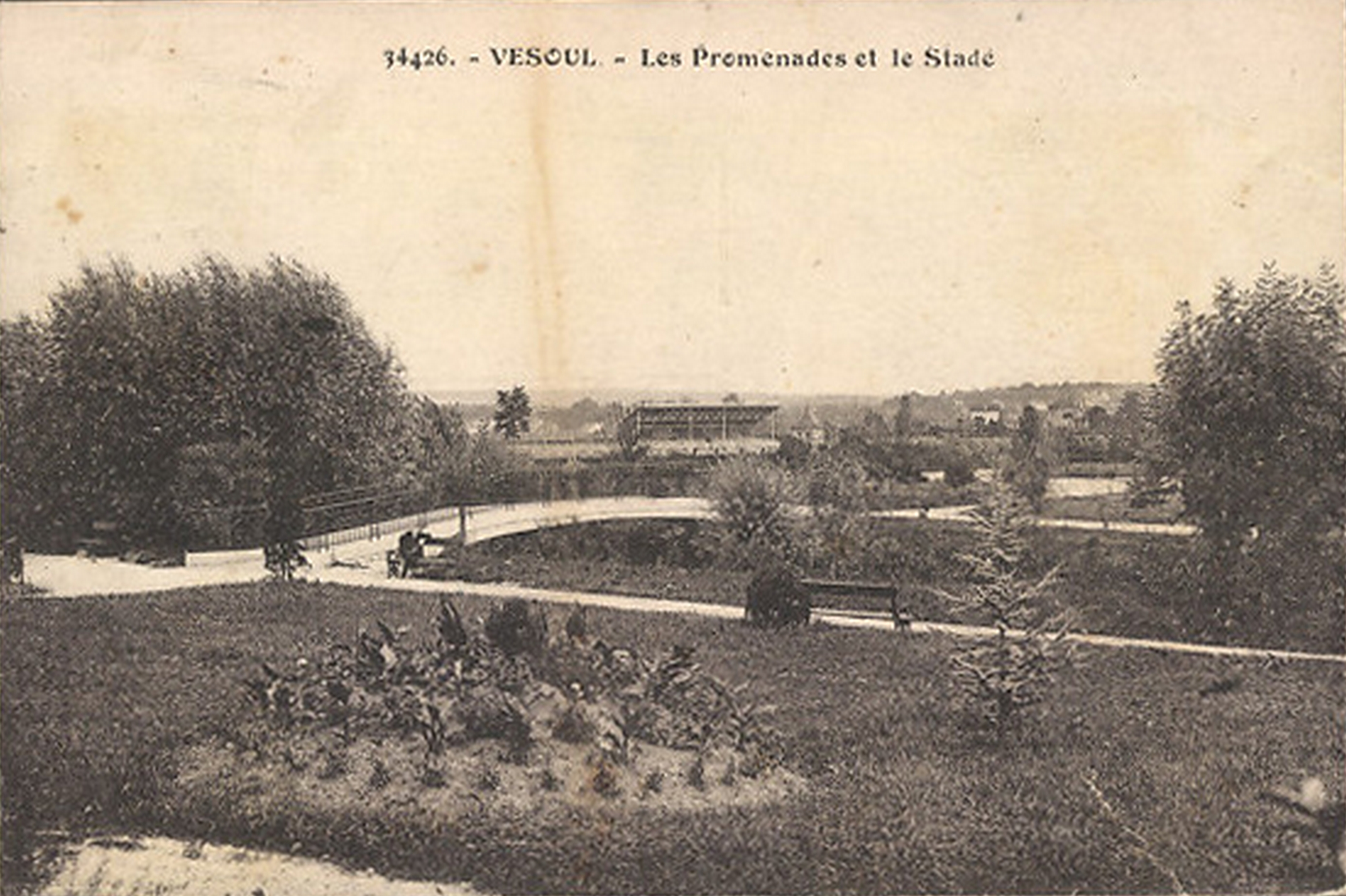 Carte postale Vesoul - Les Promenades et le Stade. Circulée en 1935.